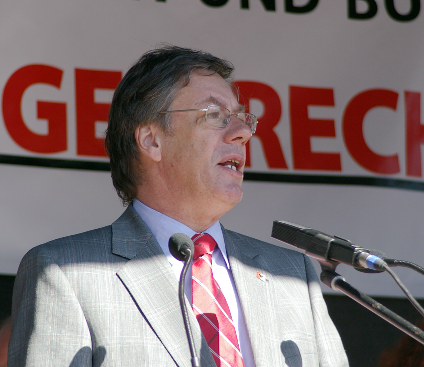 Gerhard Langemeyer, seit 1999 Oberbürgermeister der Stadt Dortmund, Kundgebung am 1. Mai 2007 auf dem Platz der alten Synagoge in Dortmund